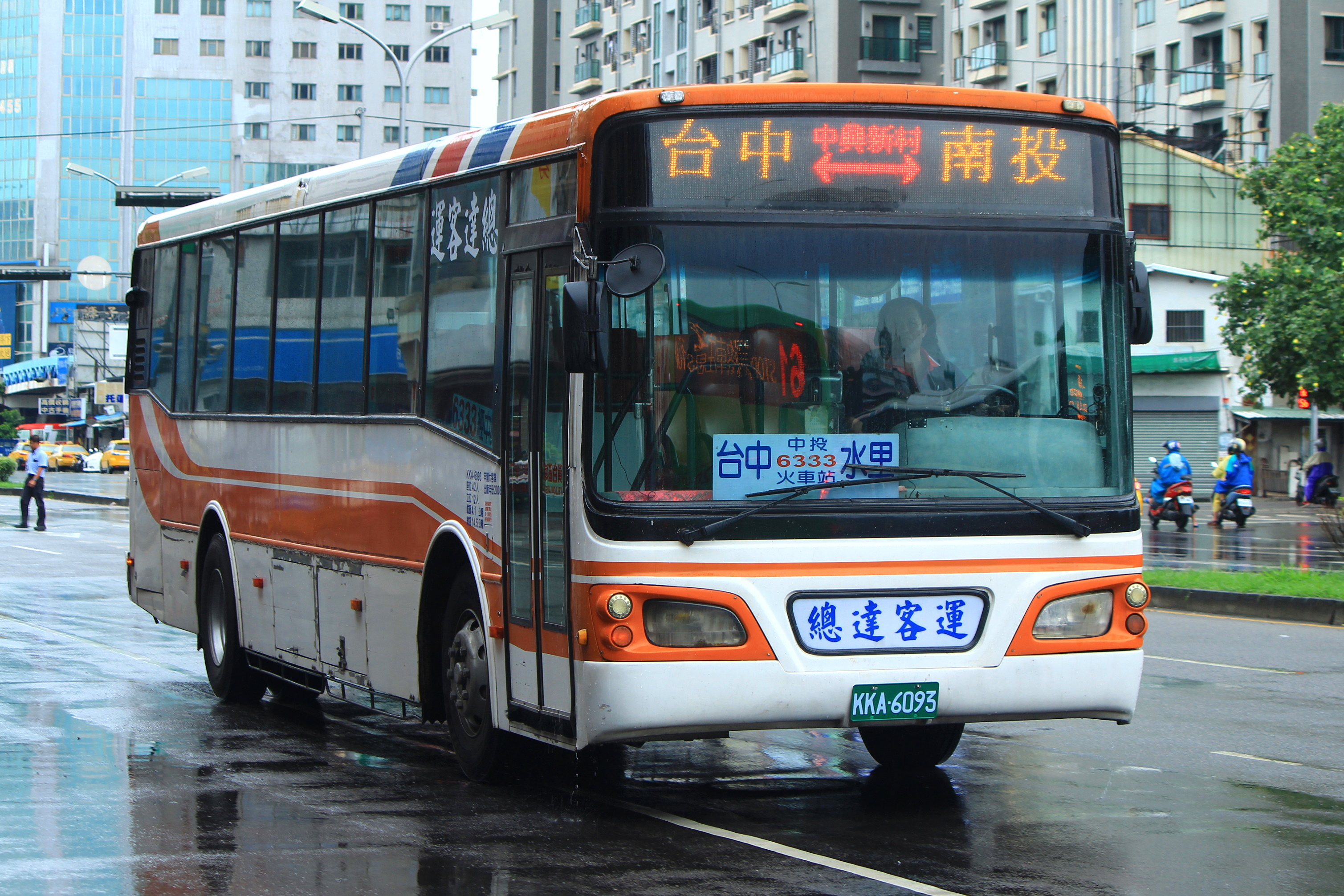 總達客運向臺北客運購入的大客車 還沒改塗裝